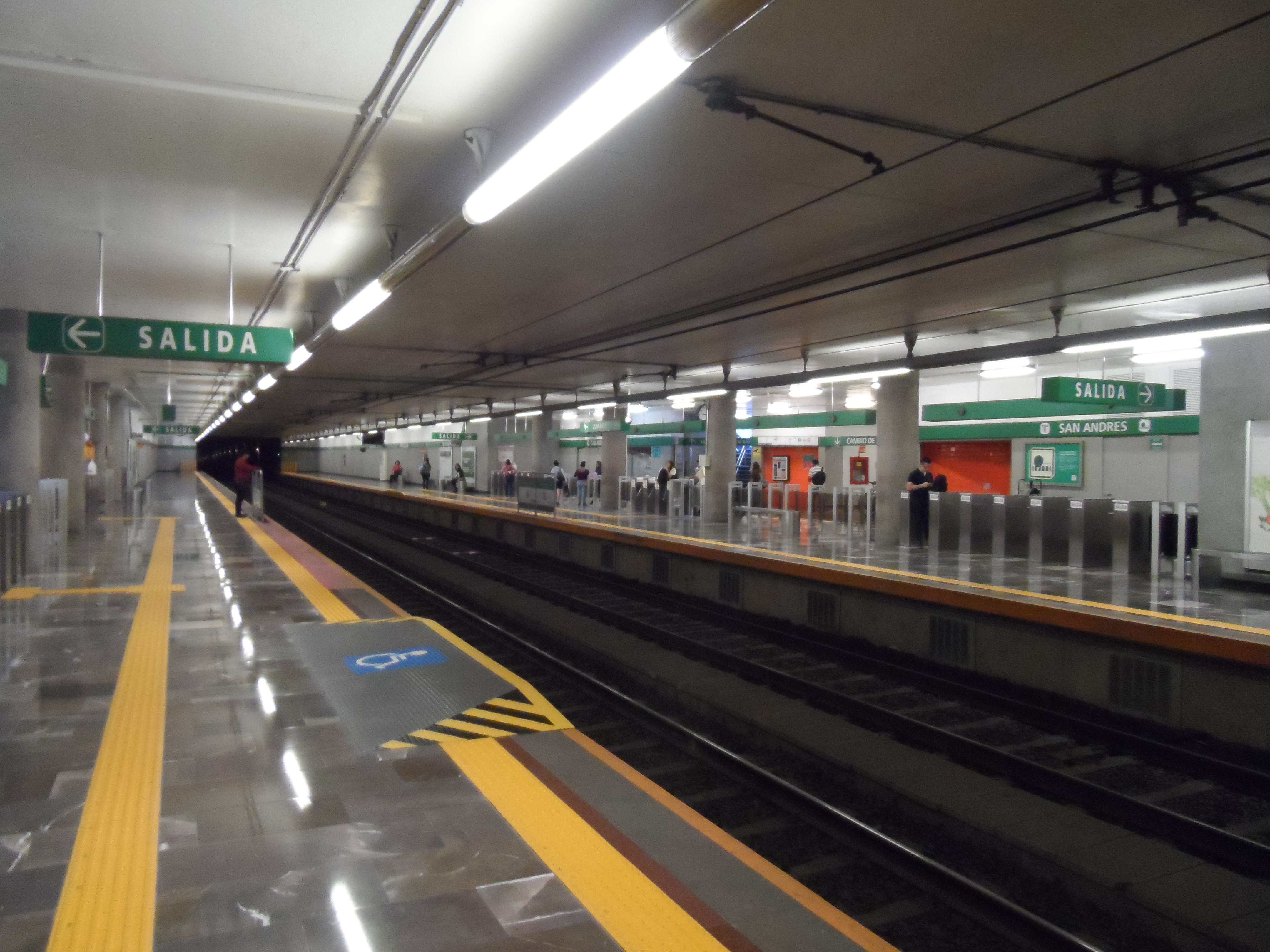 La estación "San Andrés" de la Línea 2 del Tren Ligero de Guadalajara.